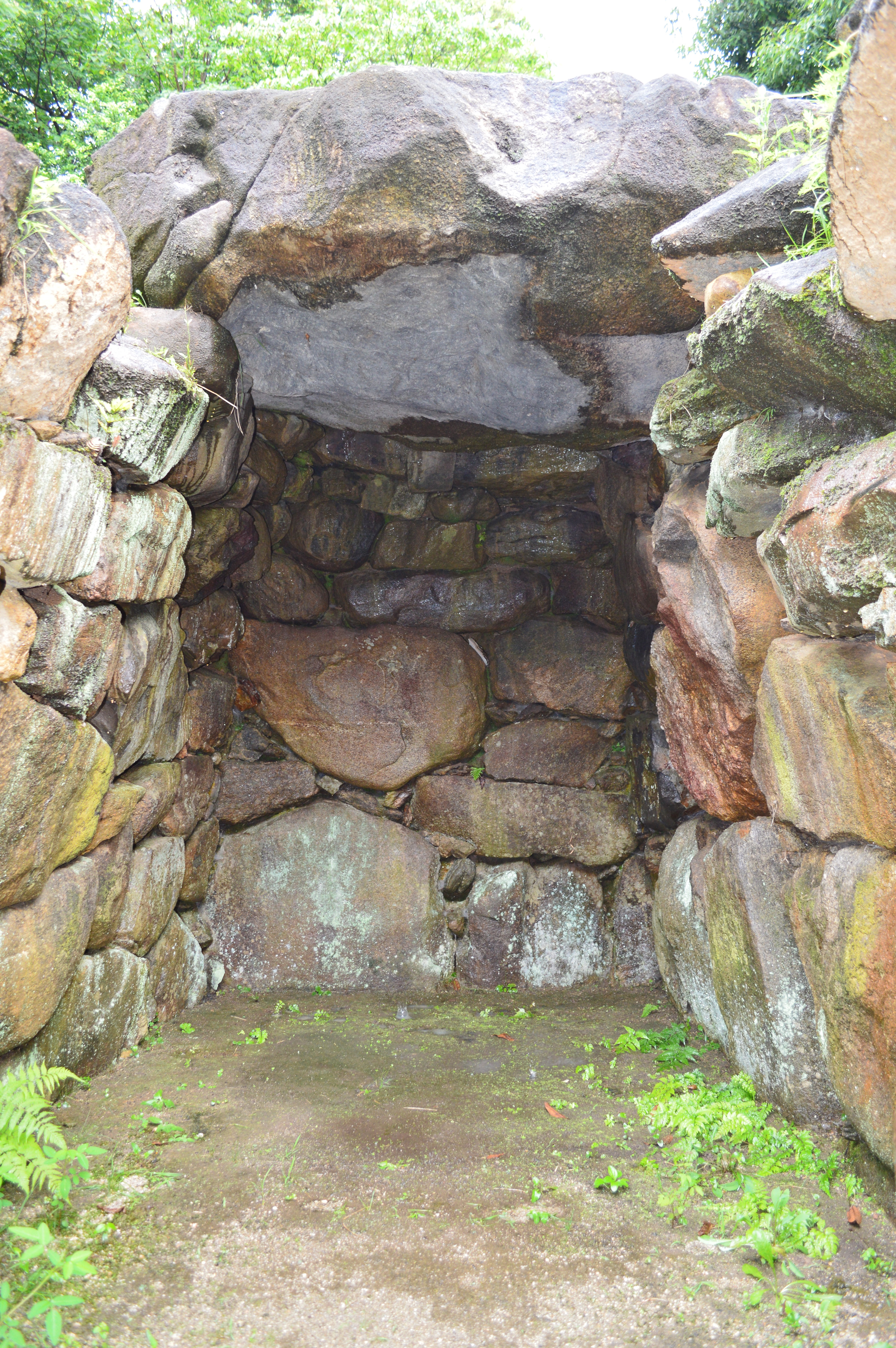 畠田古墳 石室玄室